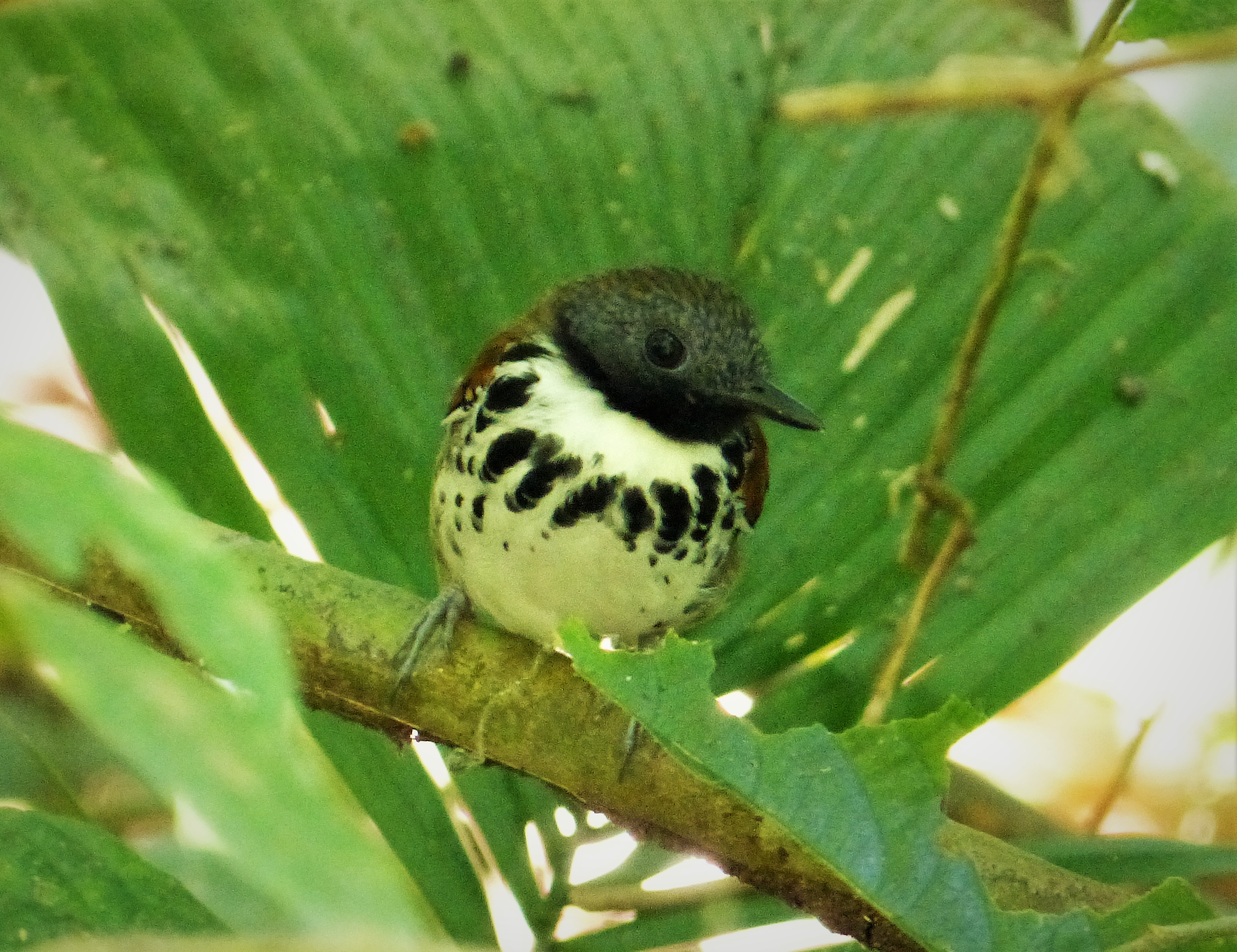 Plantation Rd. Canal zone, Panama